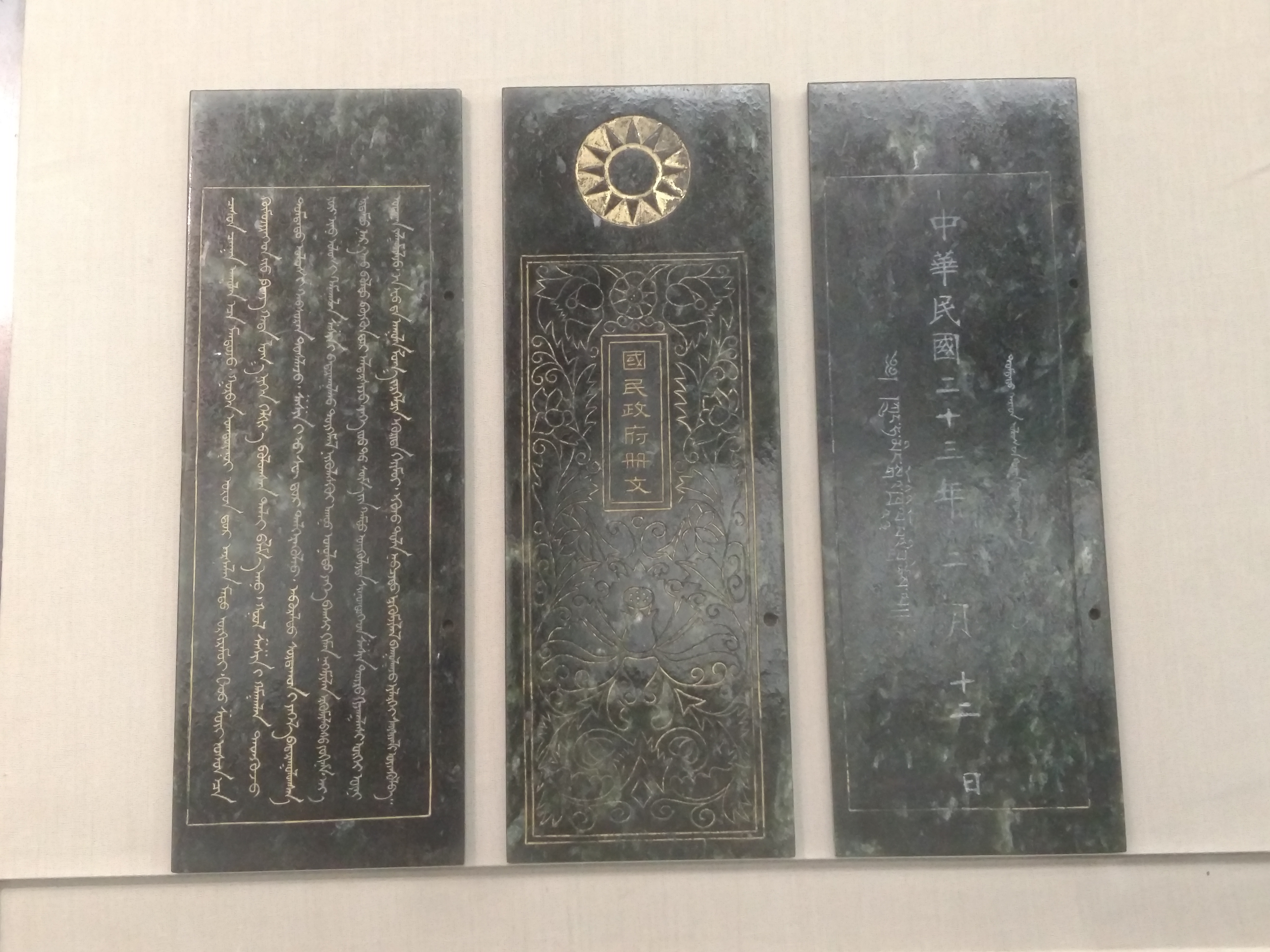 国民政府颁赐十三世达赖玉册，西藏博物馆藏